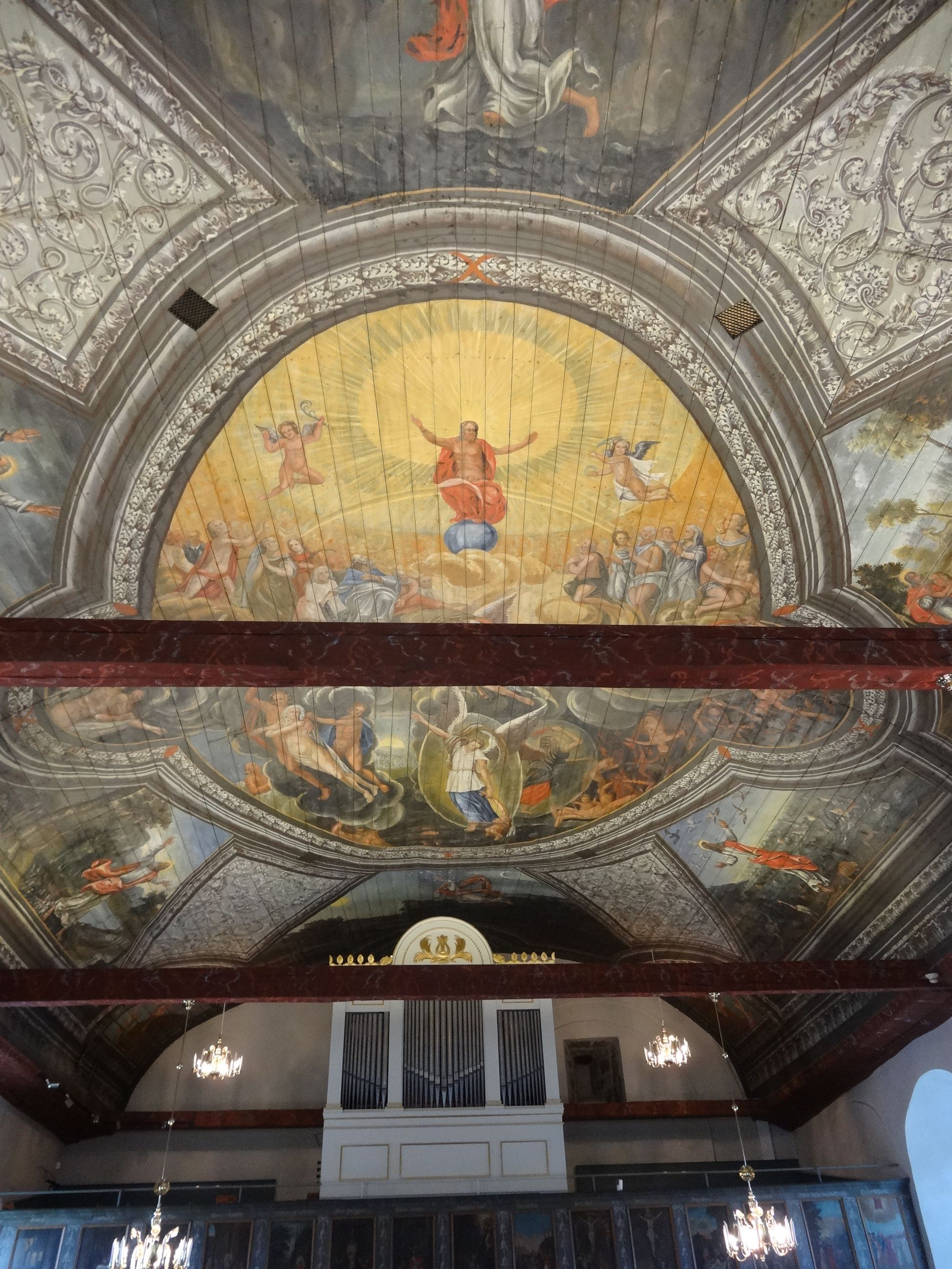 Takmålning från tidigt 1700-tal i Bro kyrka, Bohuslän. Sett från koret.